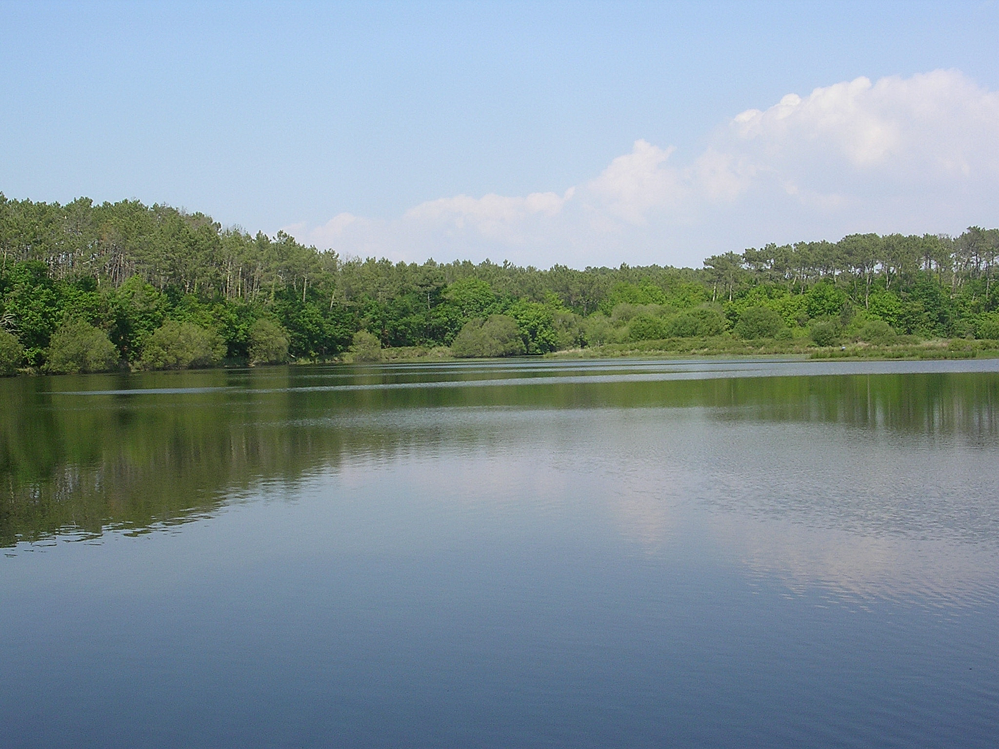 Étang de Bourg le Vieux à Bias, dans le département français des Landes